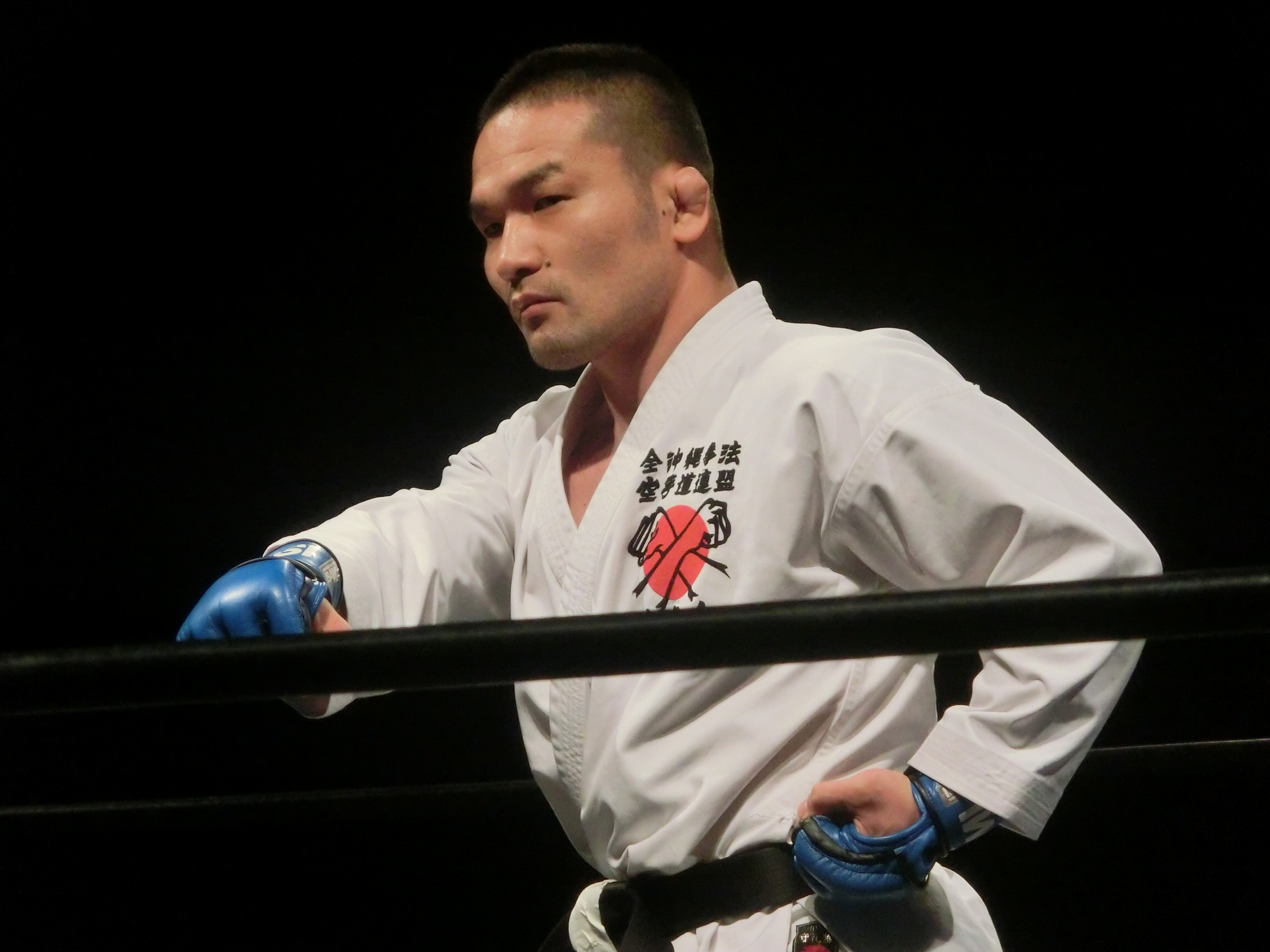 ハードヒット2019年6月8日